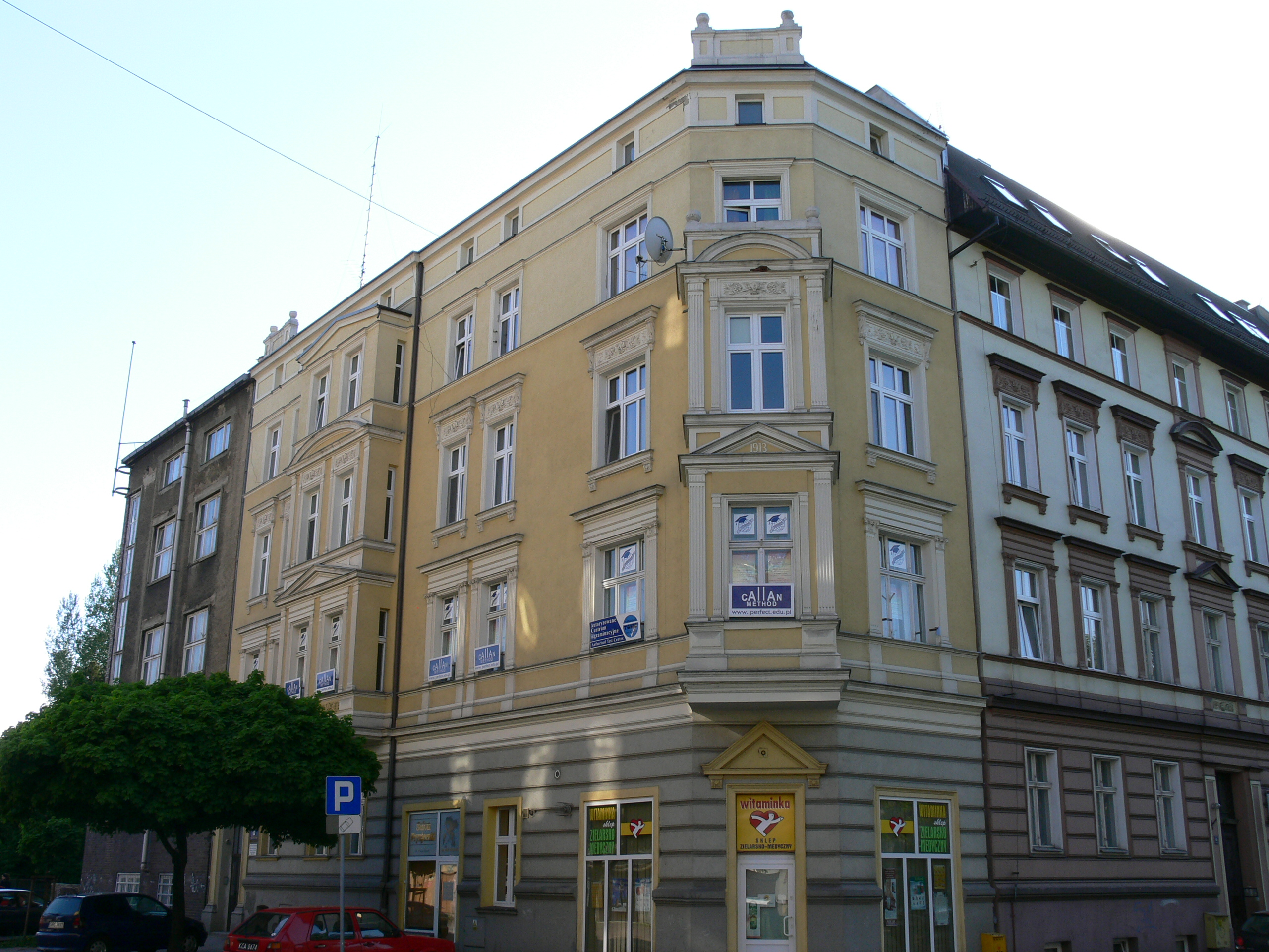 Racibórz - kamienica przy ul. Bema 1